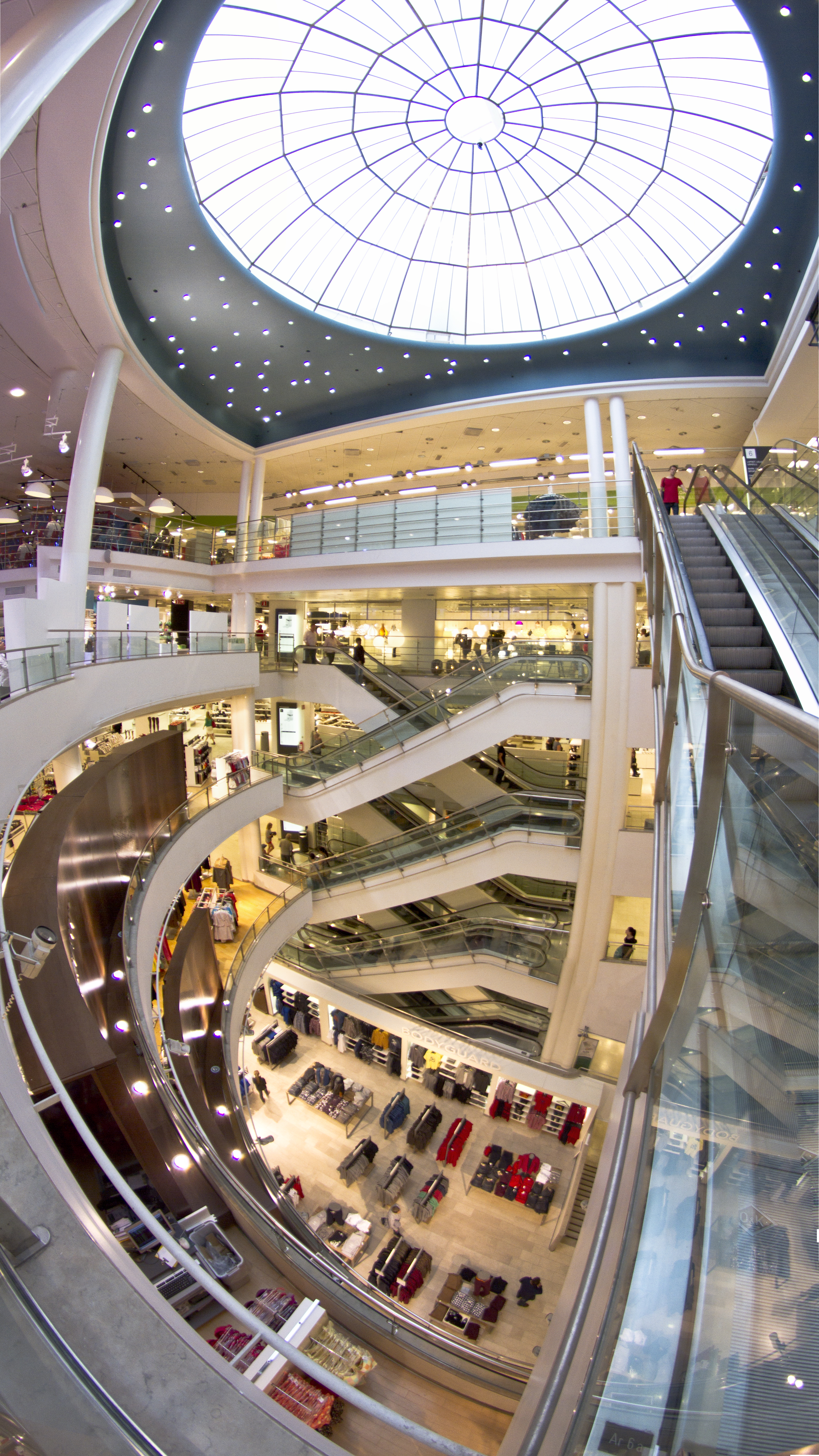 Argoksen valopiha Stockmannin tavaratalossa 2013